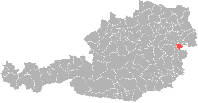 Bezirk Mattersburg in Österreich